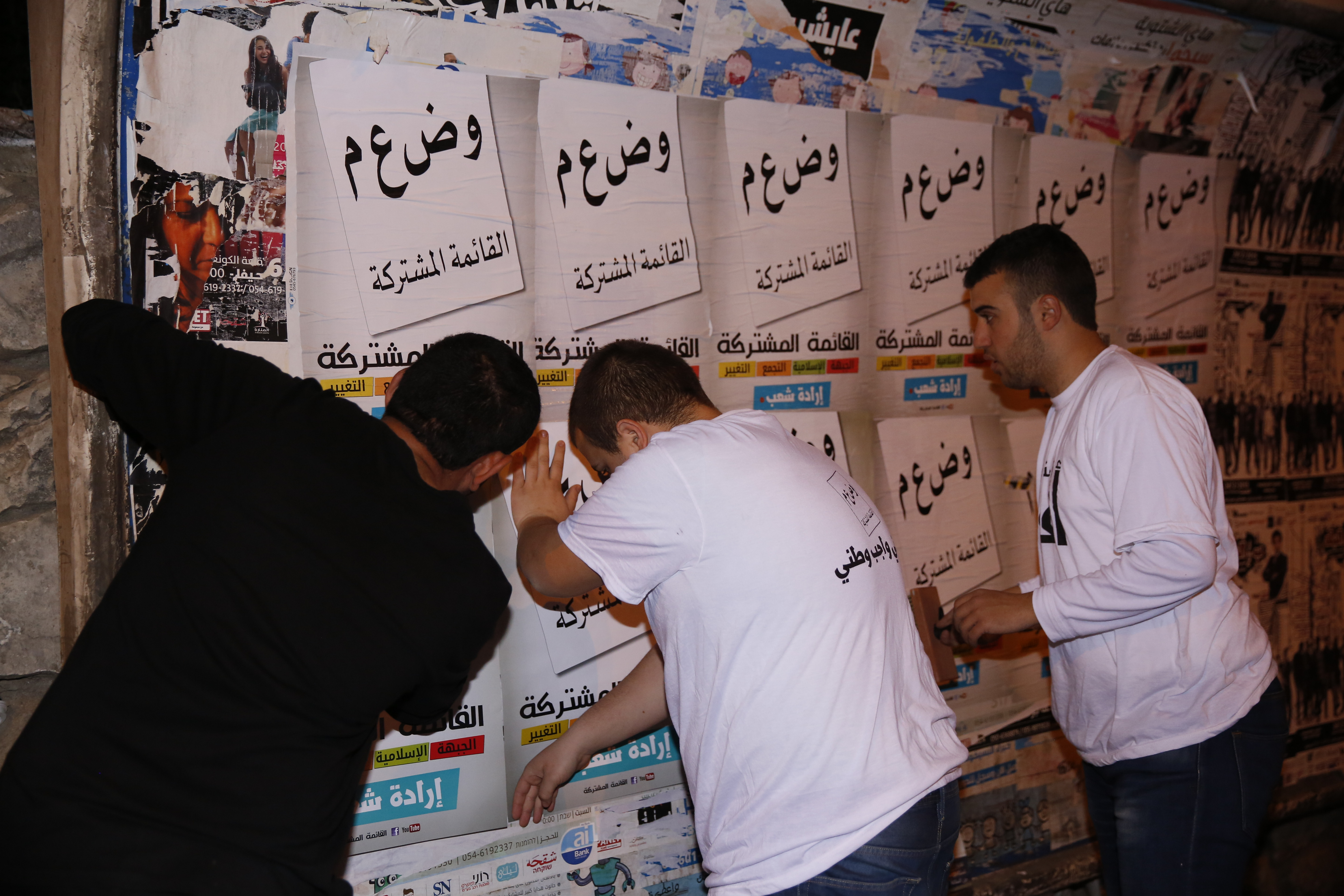 פעילים של הרשימה המשותפת